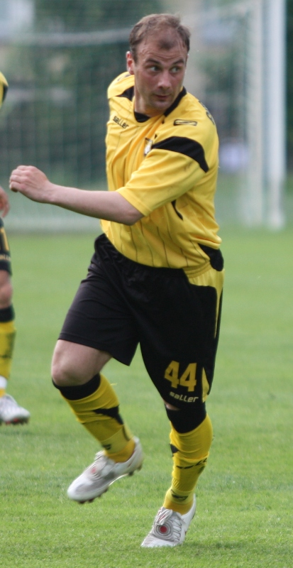 Mindaugas Grigalevičius